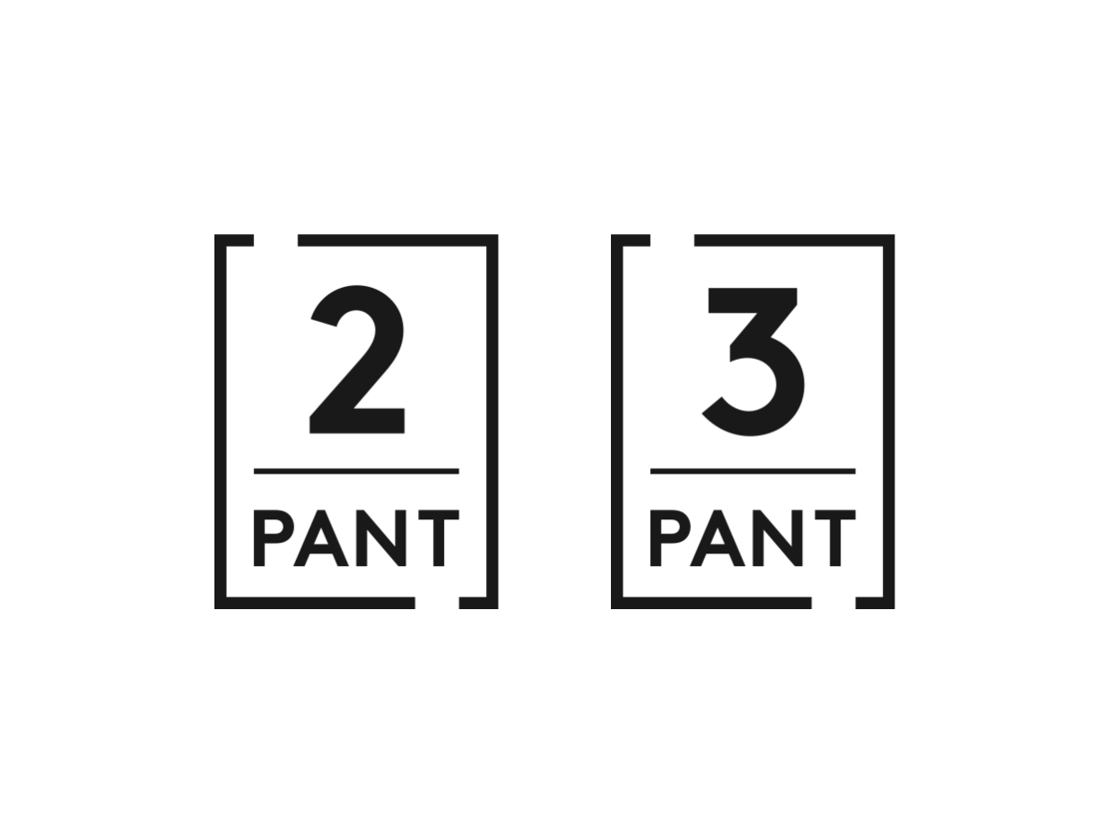 Nye pantemerker for flasker og bokser i Norge (2018)